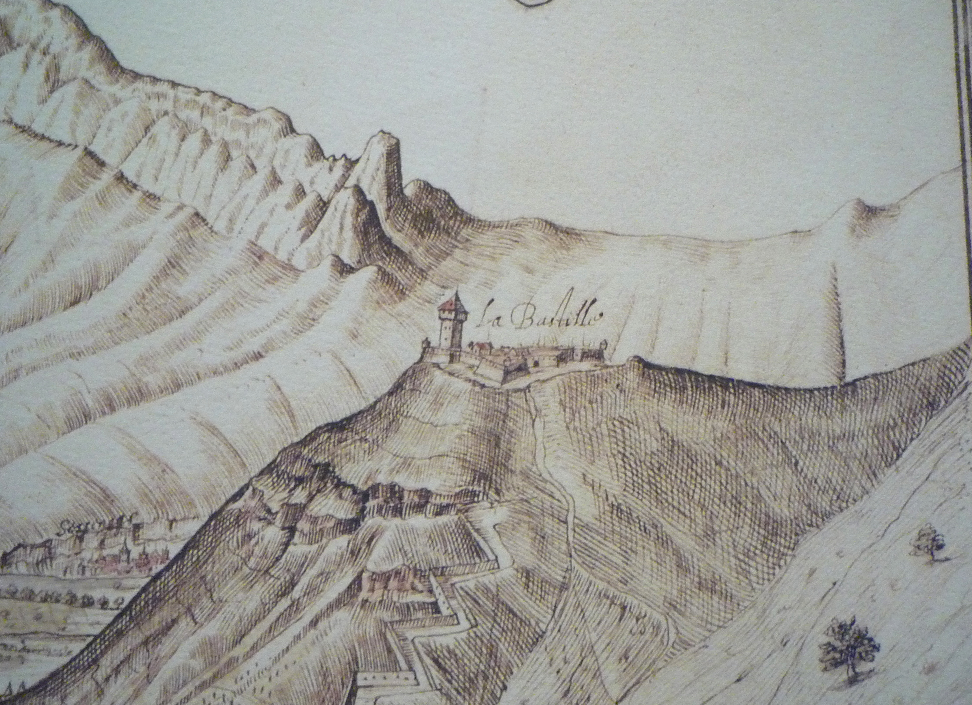 Détail de la Bastille sur un plan de la ville de Grenoble établi par Jean de Beins vers 1610.